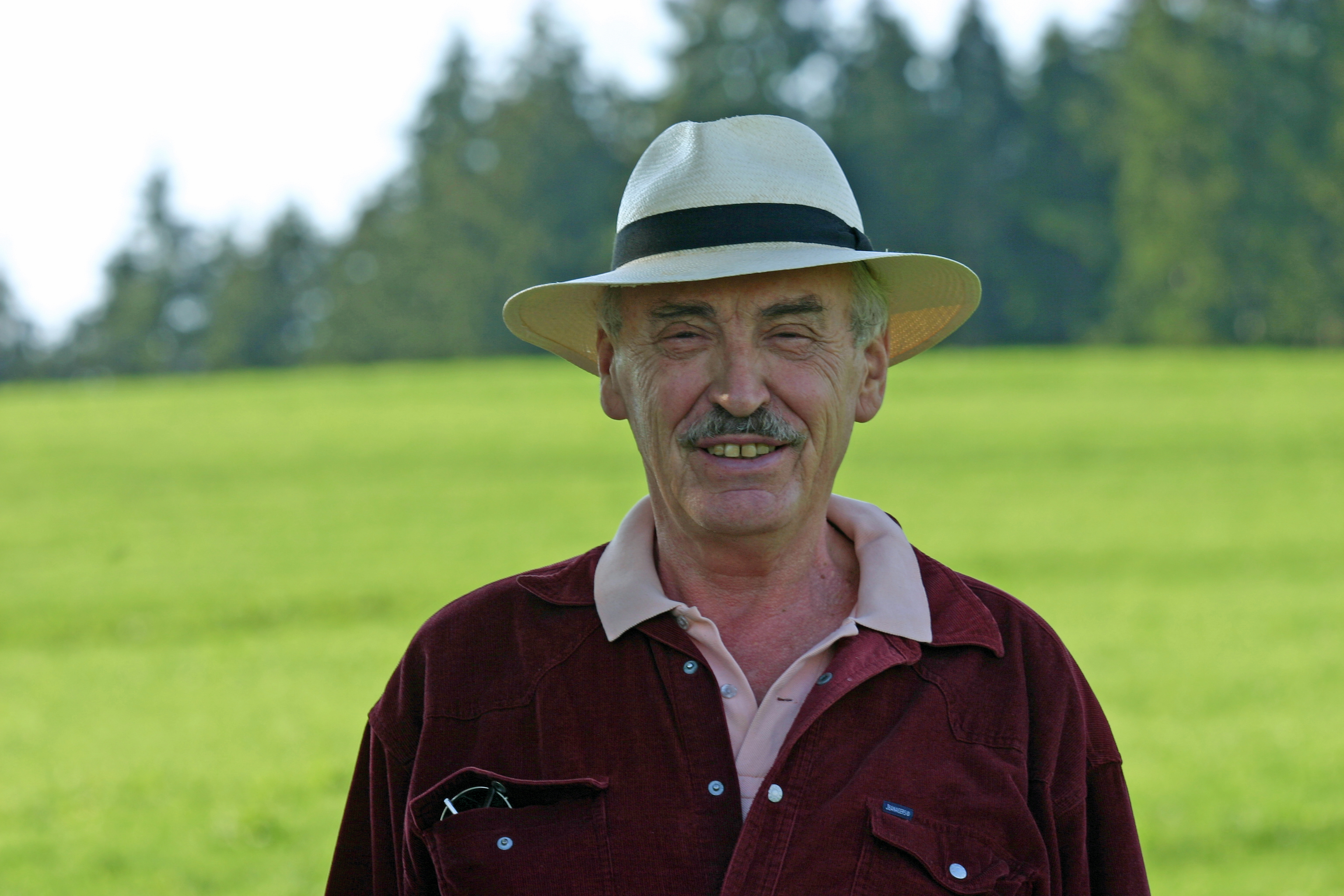 Portrait Dr. Mathias Schroeder